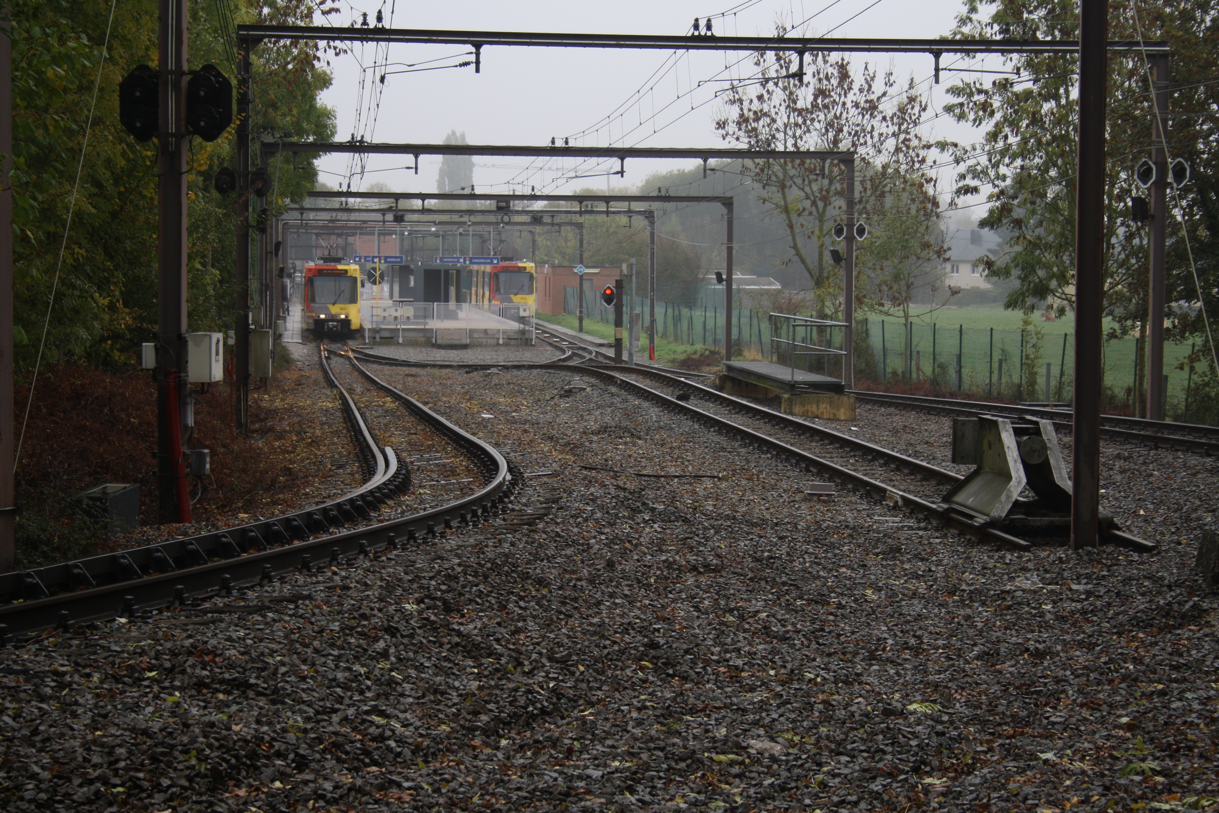 Kehrgleis Pétria der Stadtbahn Charleroi